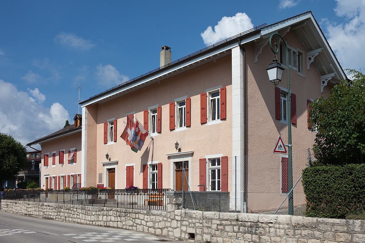 Administration Communale à Arzier